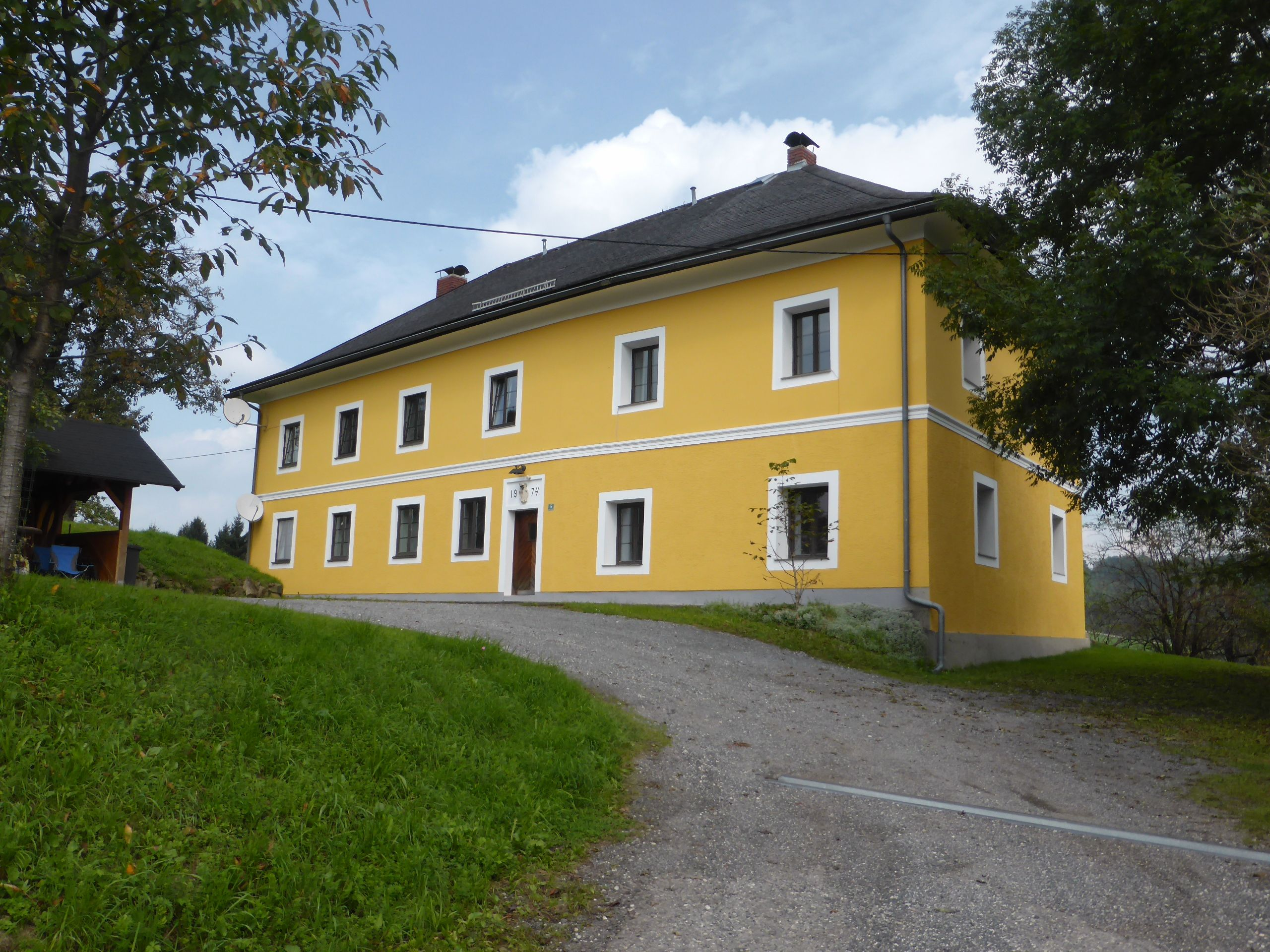 Gesamtanlage, Ehemaliges Schloss Radeck mit Schlosskapelle